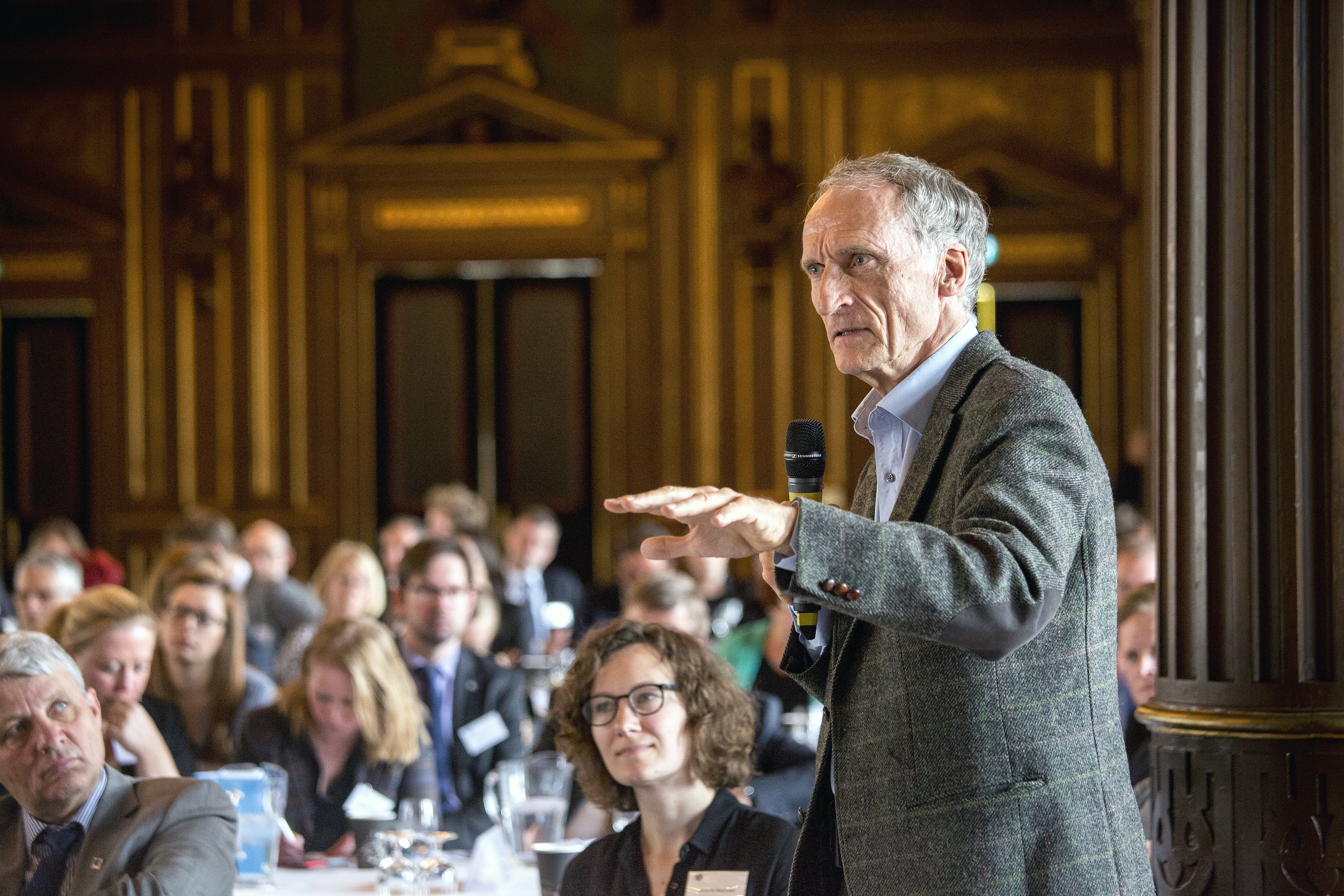 Folketingsledamoten och ledamoten av det nordiska gränshinderrådet Bertel Haarder (V) Gränshindermöte på Børsen i Köpenhamn arrangerat av Nordiska Ministerrådet. Foto: News Øresund - Johan Wessman © News Øresund, (CC BY 3.0) Detta verk av News Øresund är licensierat under en Creative Commons Erkännande 3.0 Unported-licens (CC BY 3.0). Bilden får fritt publiceras under förutsättning att källa anges (Foto: News Øresund + fotografnamn). The picture can be used freely under the prerequisite that the source is given .News Øresund är en oberoende dansk-svensk nyhets-byrå som ingår i Øresundsinstituttet.